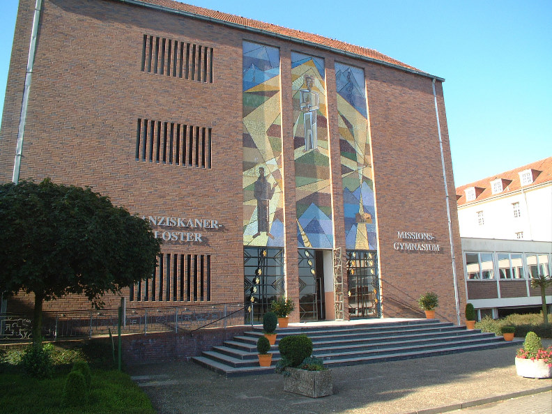 Frontansicht des Kloster Bardel